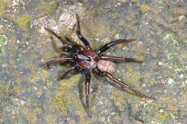 male Latouchia parameleomene from Okinawa.